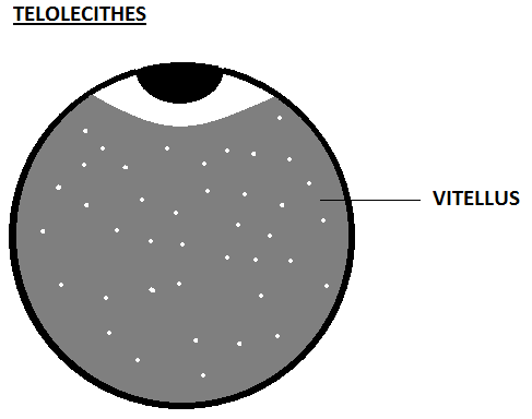 ceci est un schéma d'un type d'oeuf.